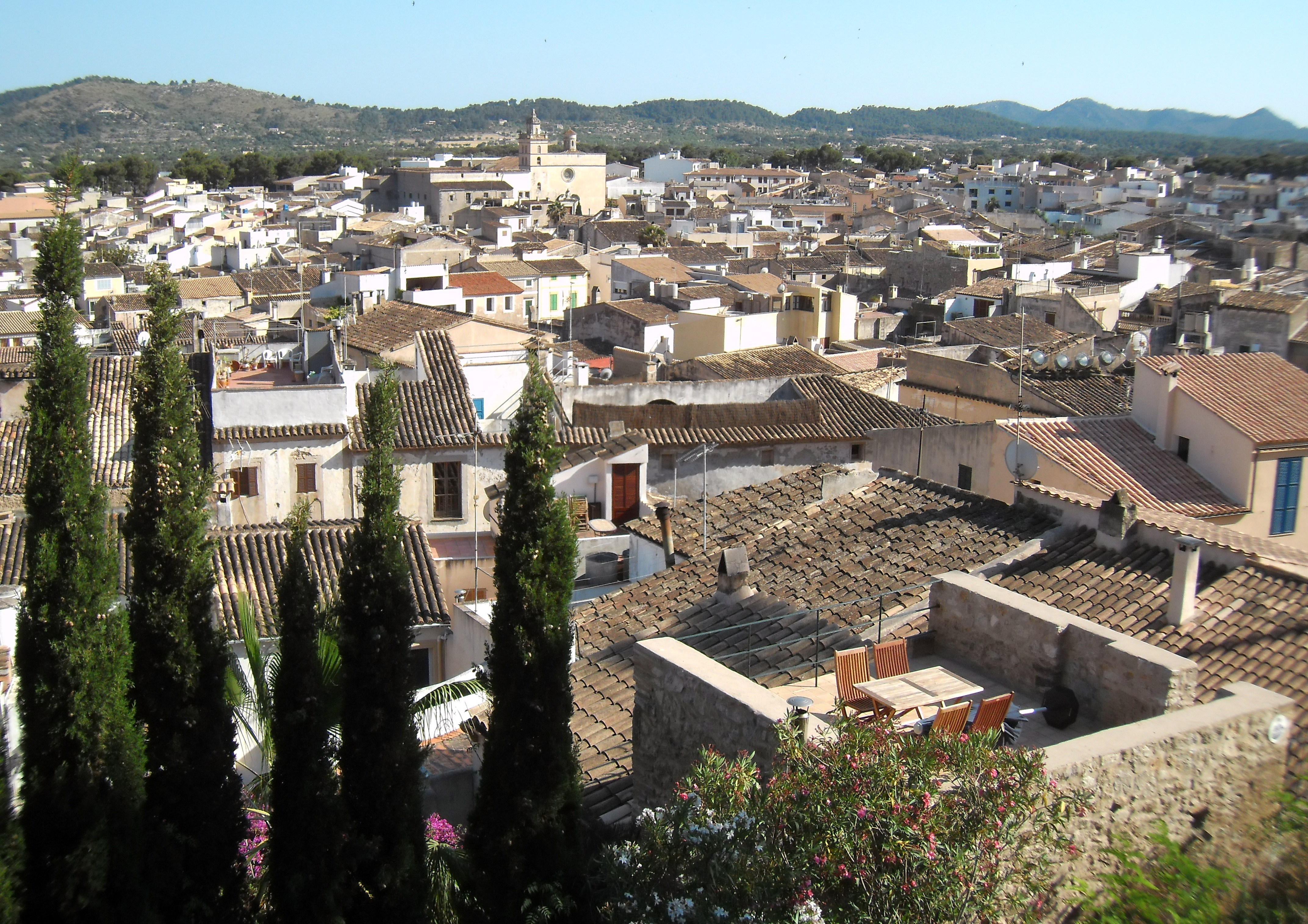 Blick von der Pfarrkirche übere die Dächer von Artà